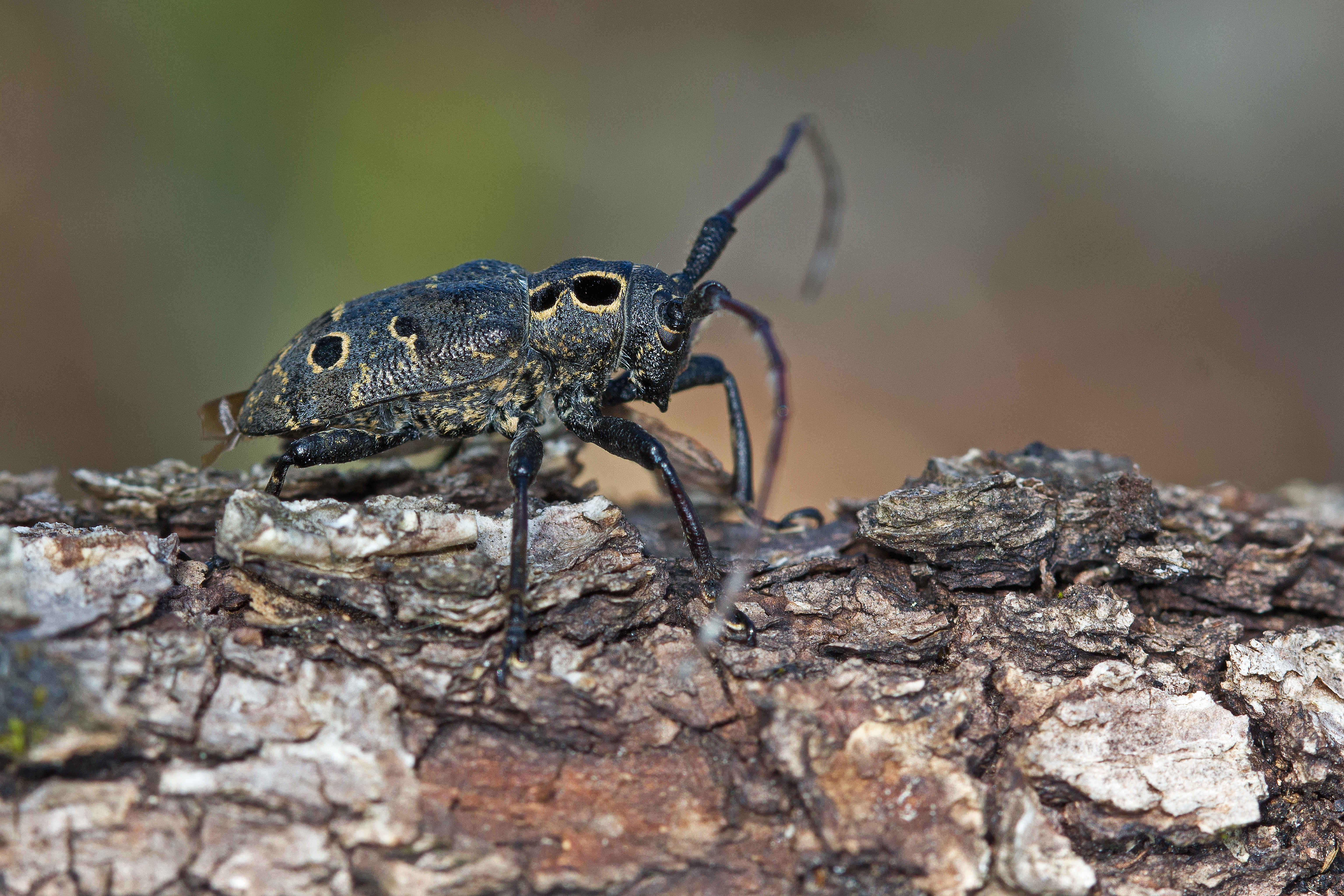 Mesosa curculionoides trouvé en lisière d'une forêt claire au sommet d'un côteau sec calcicole. Martel, France.